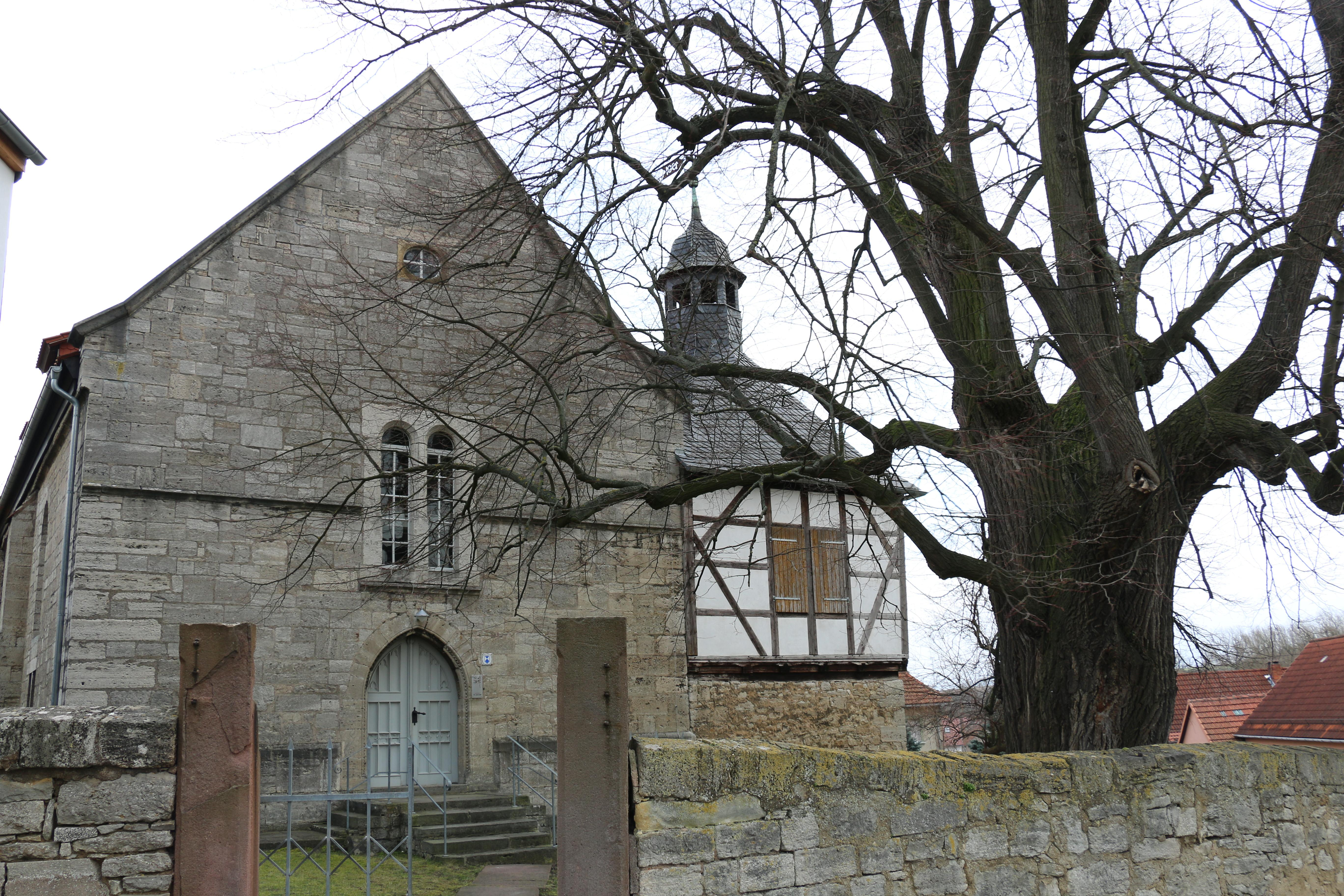 St. Jacobi-Kirche in Graoßvargula mit Kirchlinde.